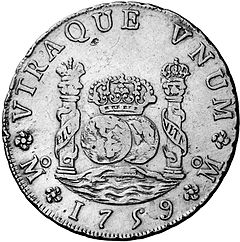 uno de los tantos símbolos de la monarquía universal española